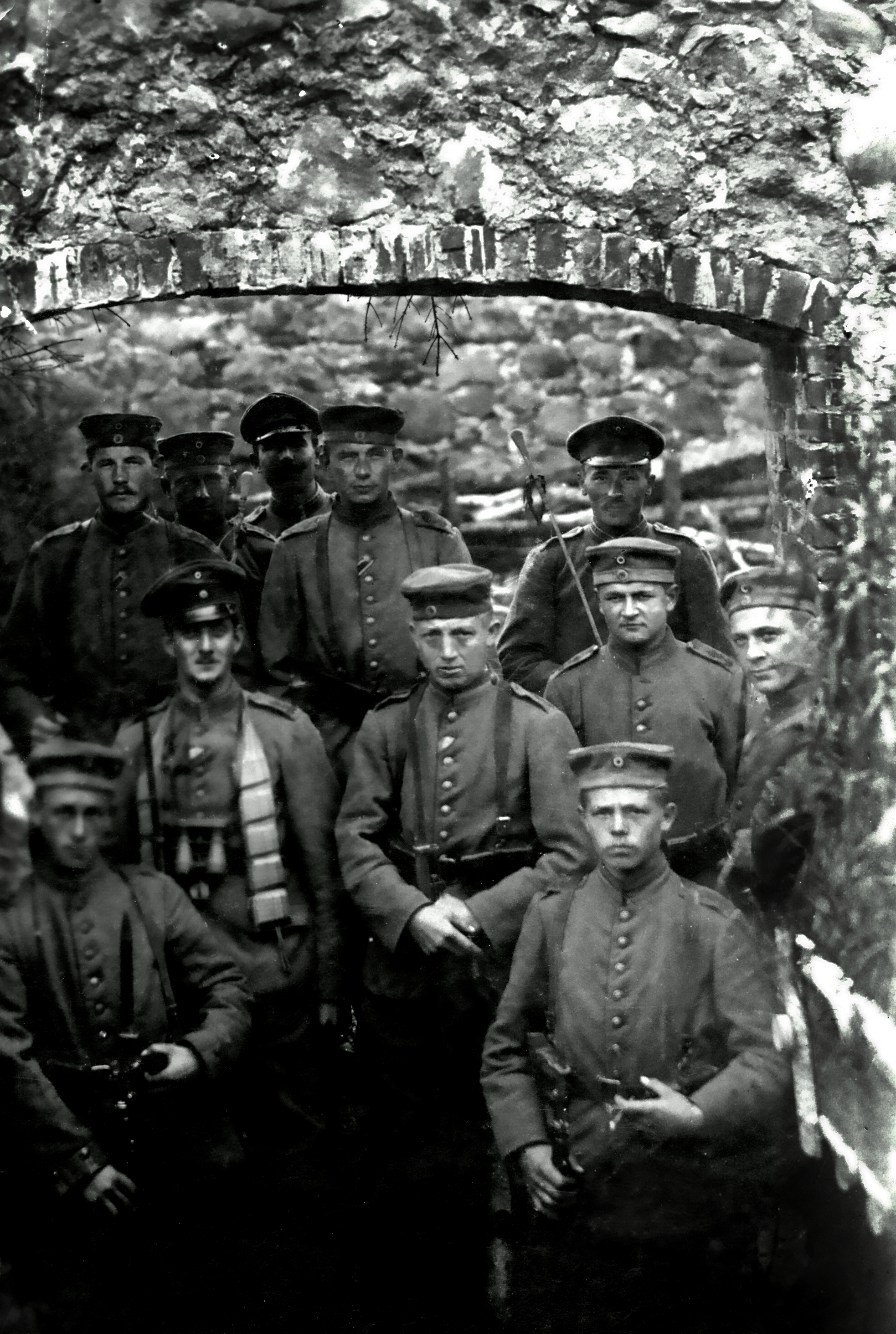 1. Großherzoglich Mecklenburgisches Dragoner-Regiment Nr. 17